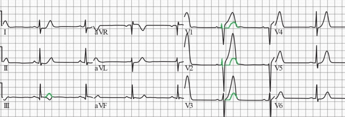 Elektrokardiografický obraz akútneho infarktu. Zeleno je vyznačený predpokladaný tvar kriviek normálneho EKG.